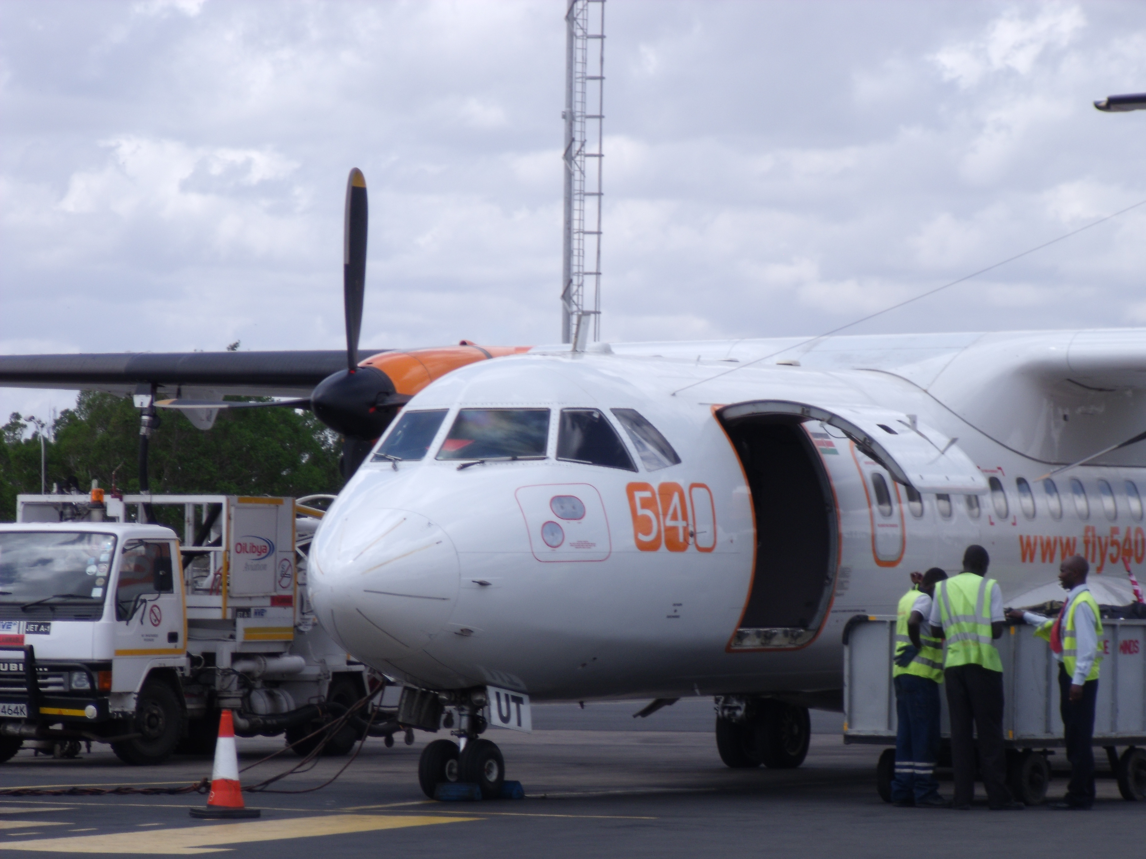 Nairobi - Jomo Kenyatta (Embakasi) (NBO / HKJK) Kenya, April 2009.